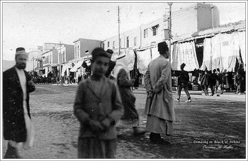 Souq Elkheja, old damascus